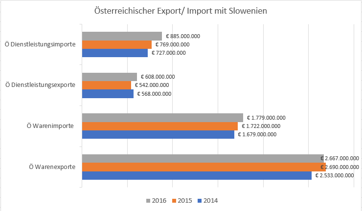 Gegenüberstellung des österreichischen Waren- bzw. Dienstleistungsexport und -Import. Daten der Wirtschaftskammer Österreich April 2017-05-272017.